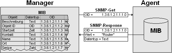 SNMP-Kommunikation zwischen Manager und Agenten